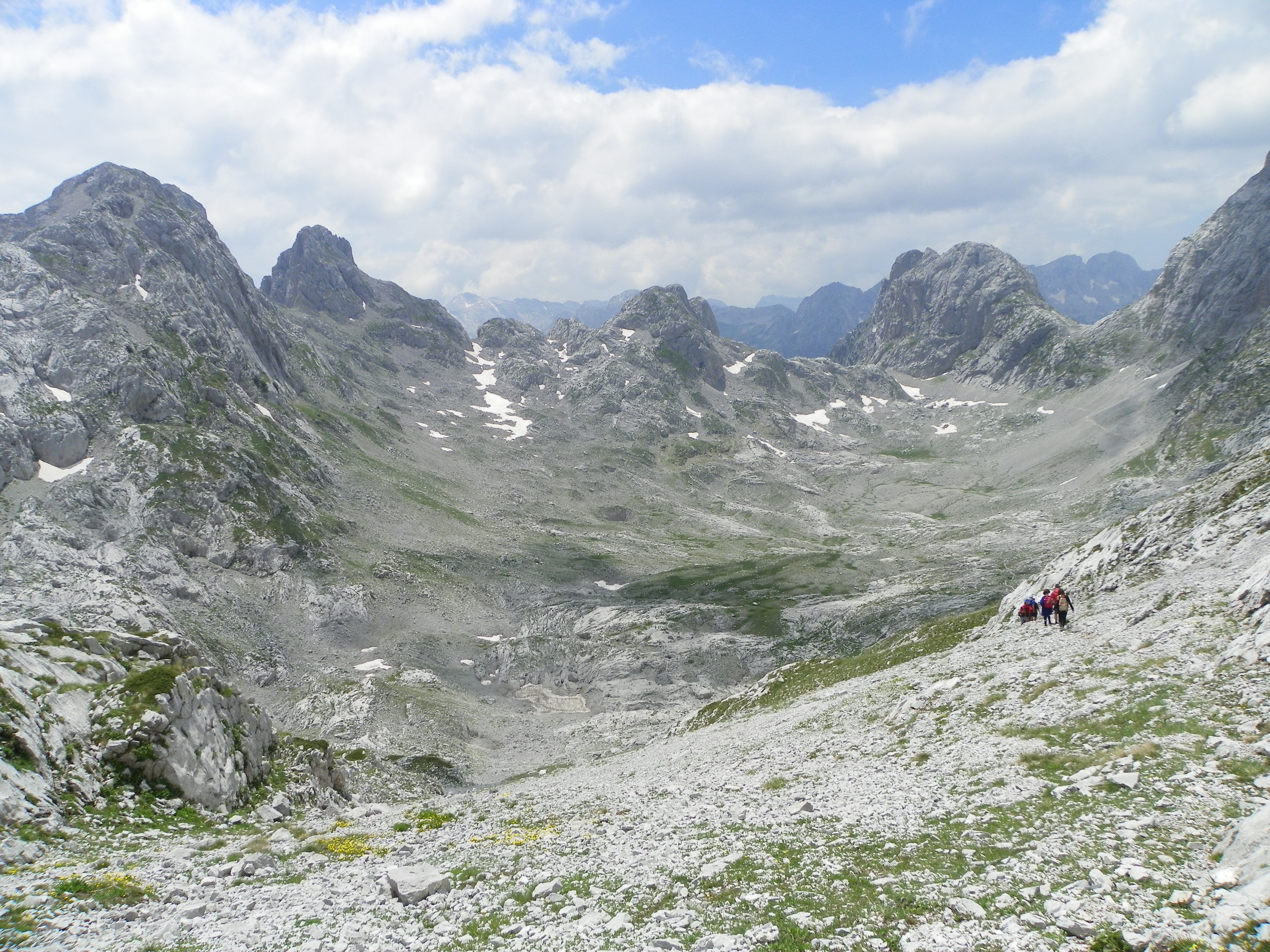 Thethi, Shkoder